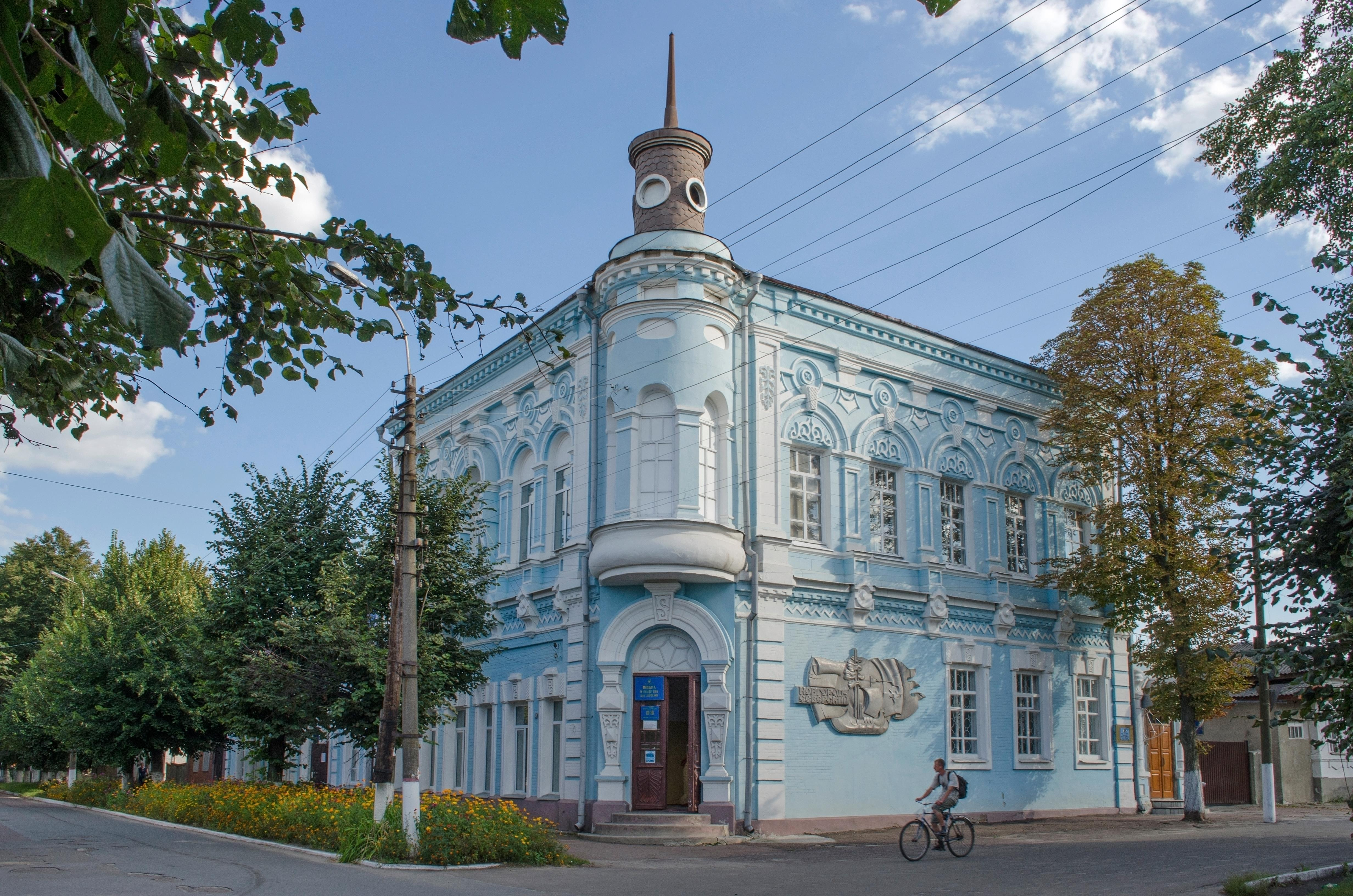 Будинок купця Медведєва, Новгород-Сіверський, вул. К. Маркса, 10